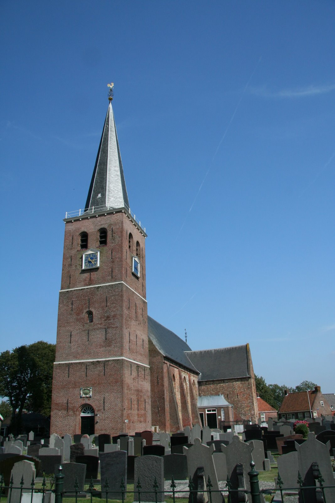 De 13e eeuwse Hervormde St- Martinus kerk in Hallum.